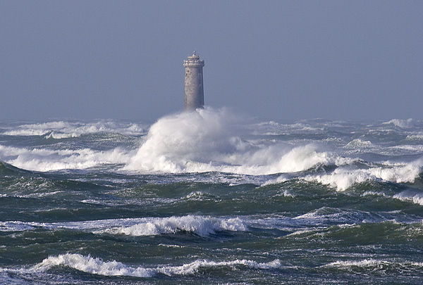 Les Phare des Baleineaux dans la tempête - Île de Ré - France